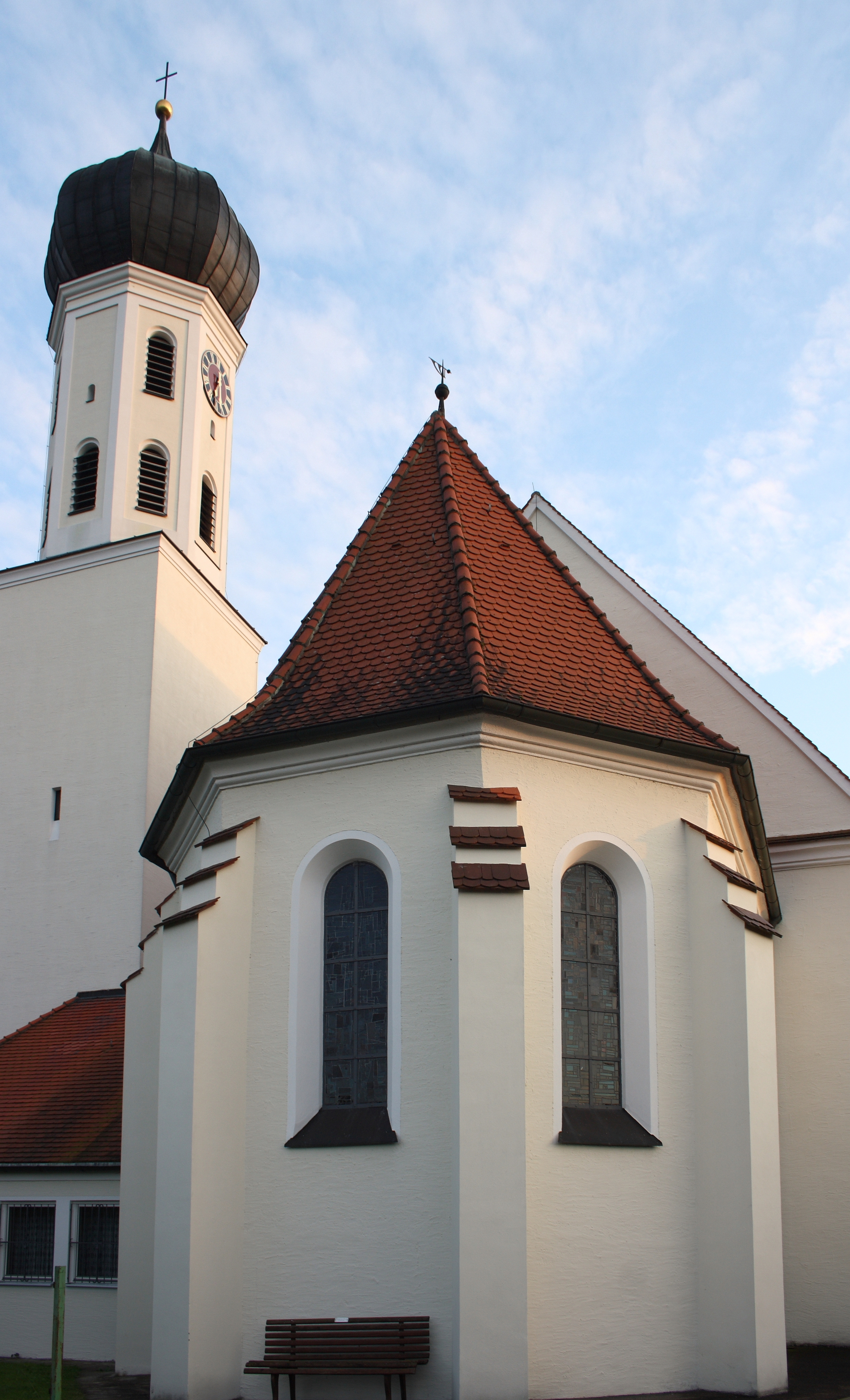 Katholische Pfarrkirche St. Veit in Unterglauheim, einem Ortsteil von Blindheim im Landkreis Dillingen an der Donau (Bayern)